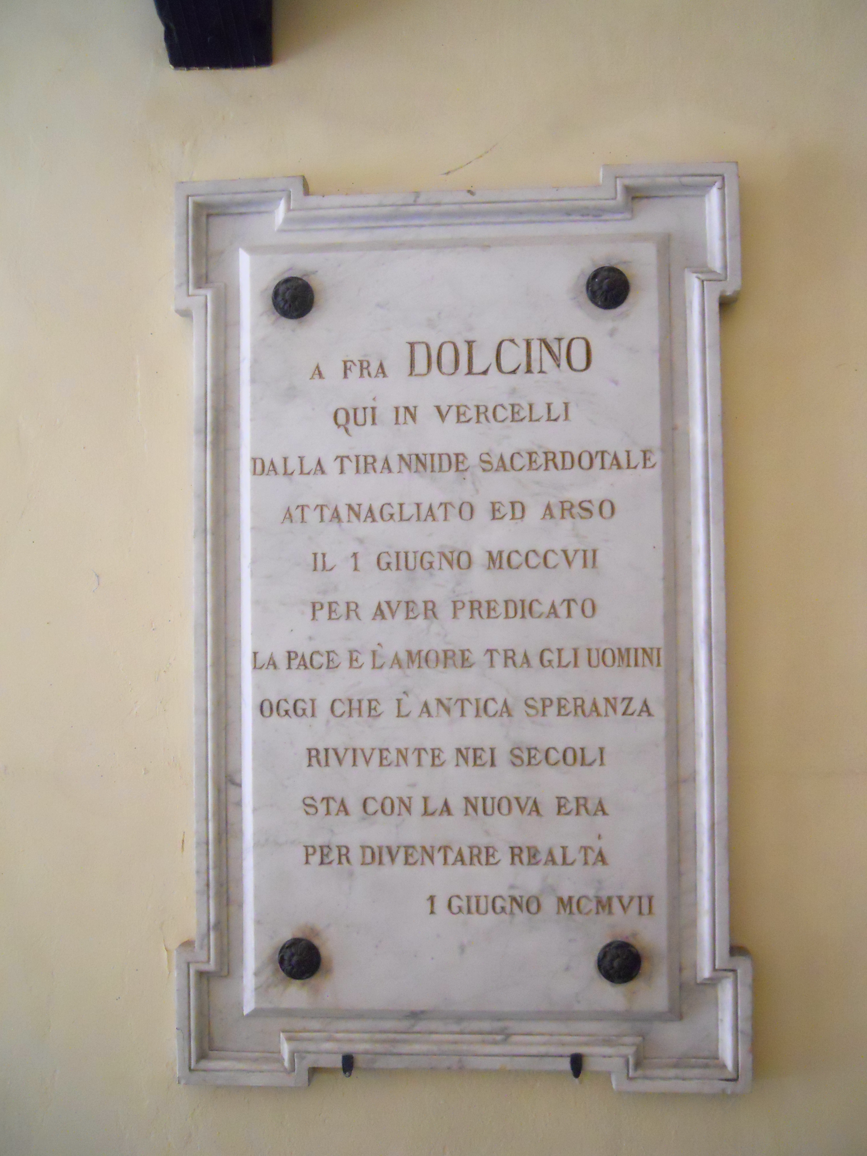 Targa in ricordo di Fra Dolcino a Vercelli